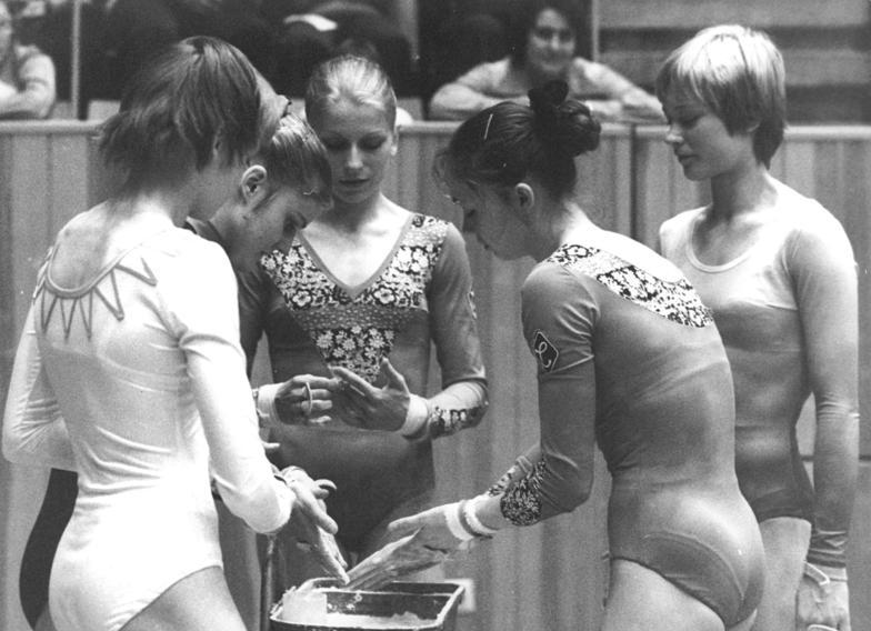 ADN-ZB Schaar 21.3.76 Suhl: DDR-Meisterschaften der Turnerinnen - Bei der Vorbereitung auf den Wettkampf: Steffi Kräker, Marion Kische, Gitta Escher, Ricarda Schmeißer und Angelika Hellmann (vlnr). Die Hallenserin Gitta Escher ging aus den DDR-Meisterschaften, die am 20.3.76 zu Ende gingen, als die erfolgreichste Teilnehmerin hervor. Nach ihrem Erfolg im Mehrkampf holte sie sich auch den Titel auf dem Schwebebalken und im Bodenturnen. Am Stufenbarren gewann Marion Kische.